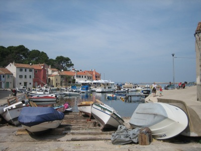 Rovenska harbour near Veli Losinj in Croatia / Ribarska luka Rovenska kod Velog Lošinja